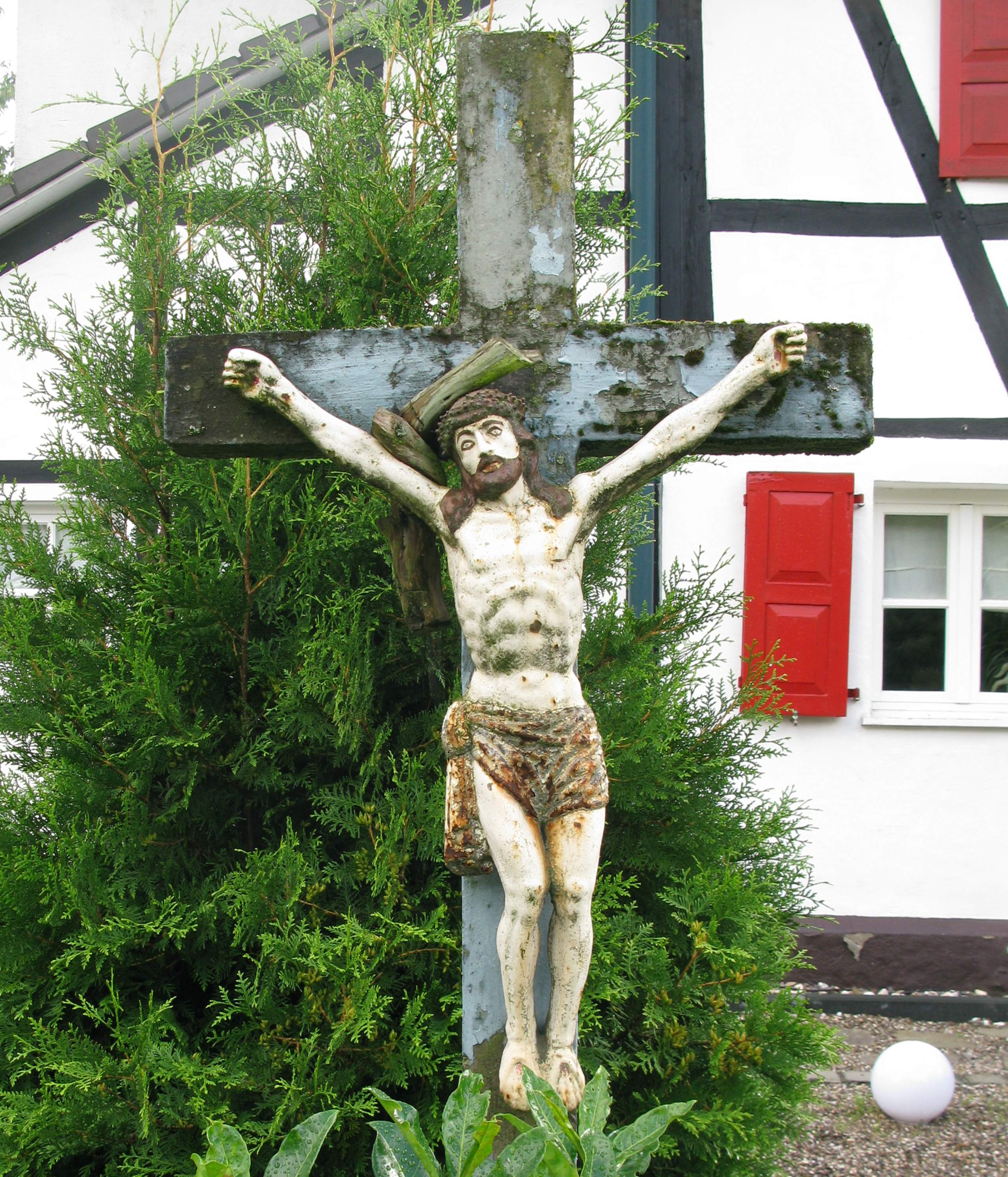 Wegekreuz Honsbacher Straße 34, 53797 Lohmar - Neuhonrath am 15. September 2010